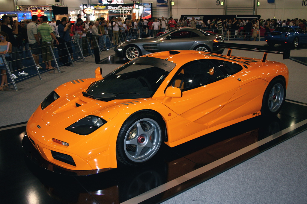 A McLaren F1 LMMcLaren F1